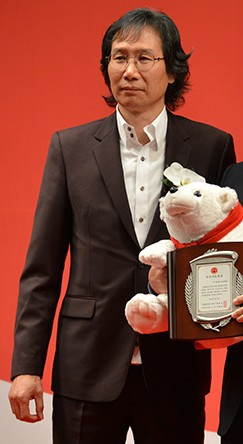 제20회 코카-콜라 체육대상 시상식